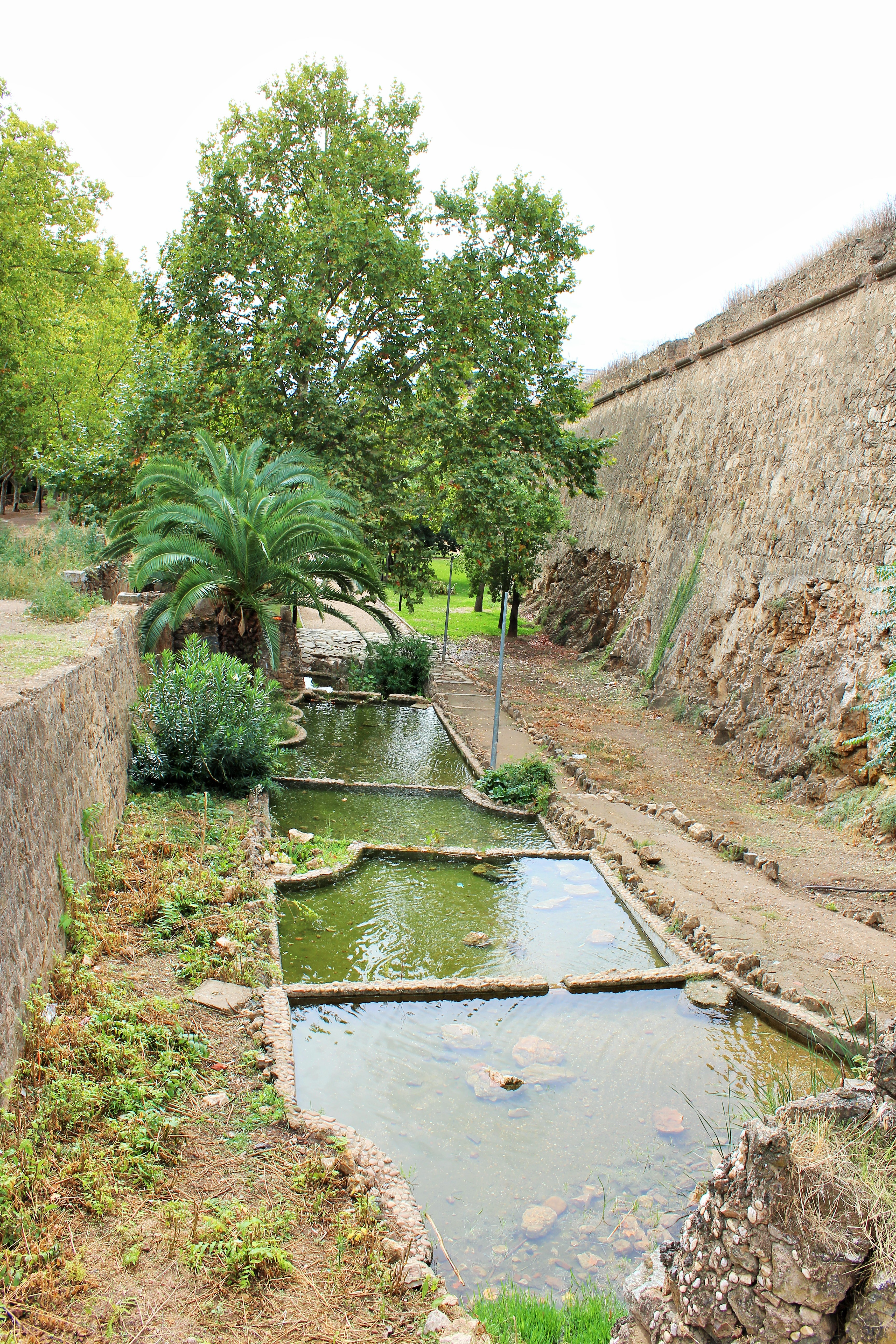 Foso exterior.